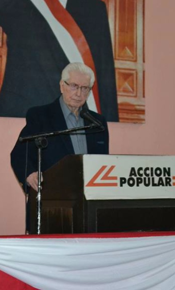 Javier Alva en evento en Paseo Colón